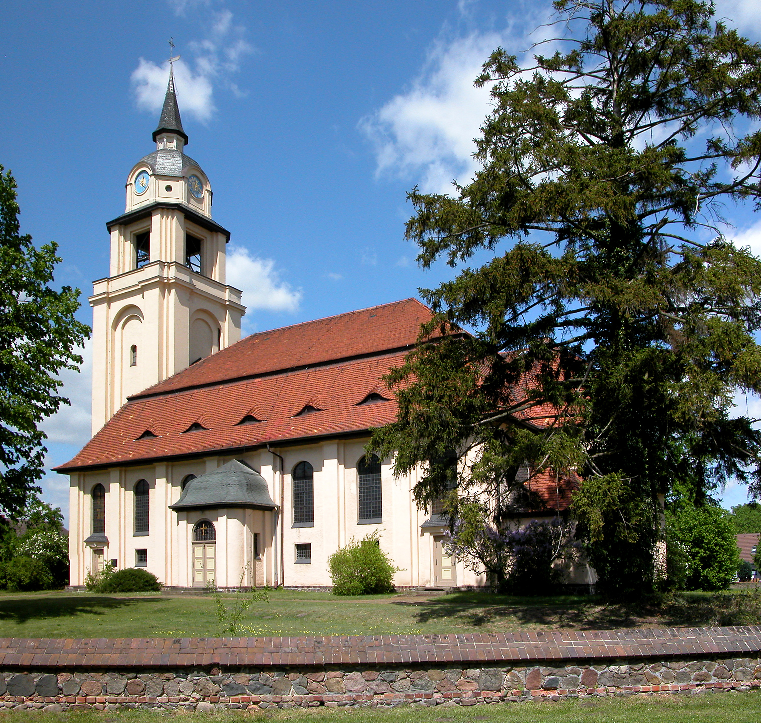 13.05.2015 03229 Altdöbern: Kirche. [DSCN5582+5583.JPG]20150513175MDR.JPG(c)Blobelt